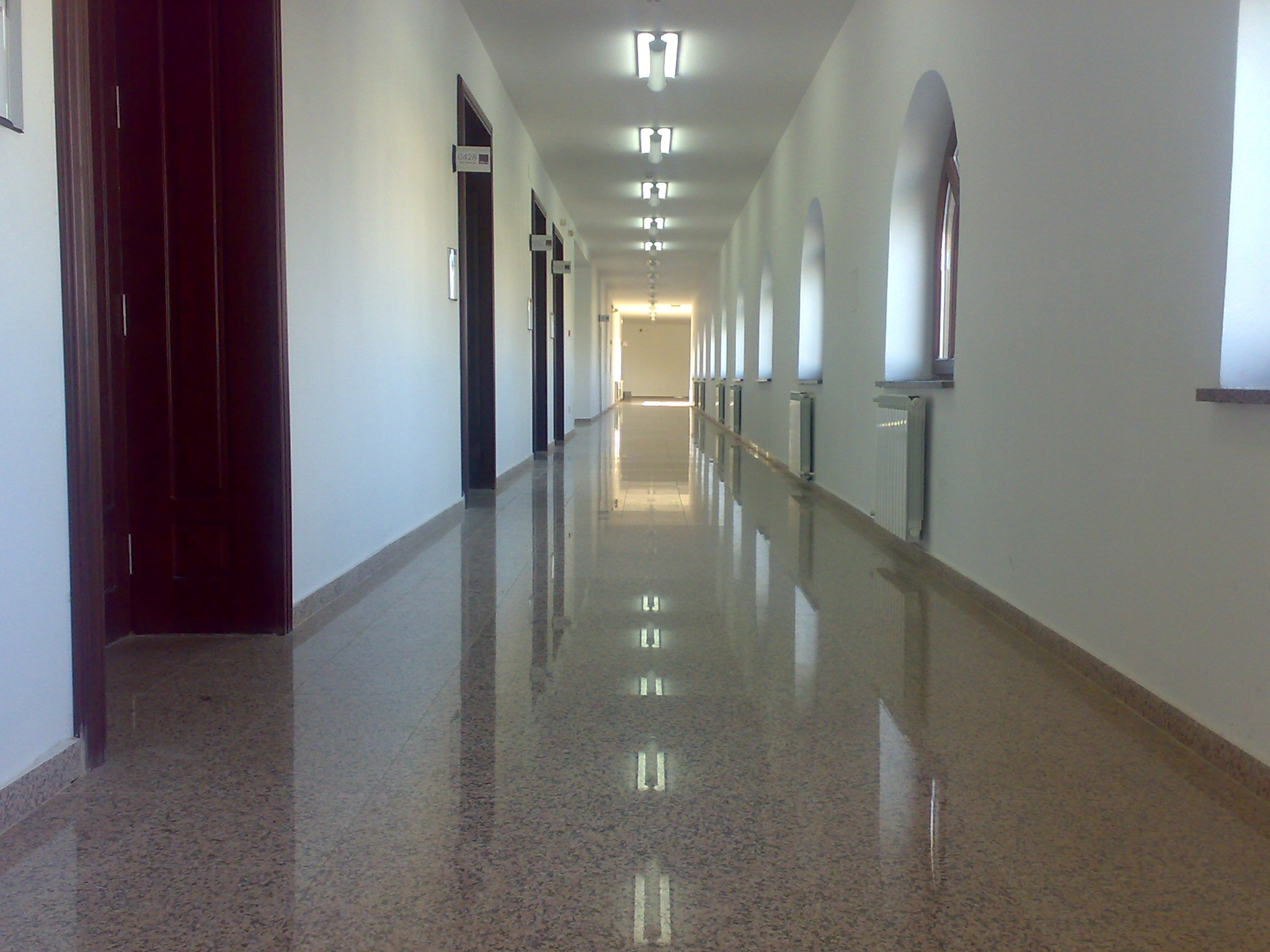 Cladirea ASE Bucureşti în interior